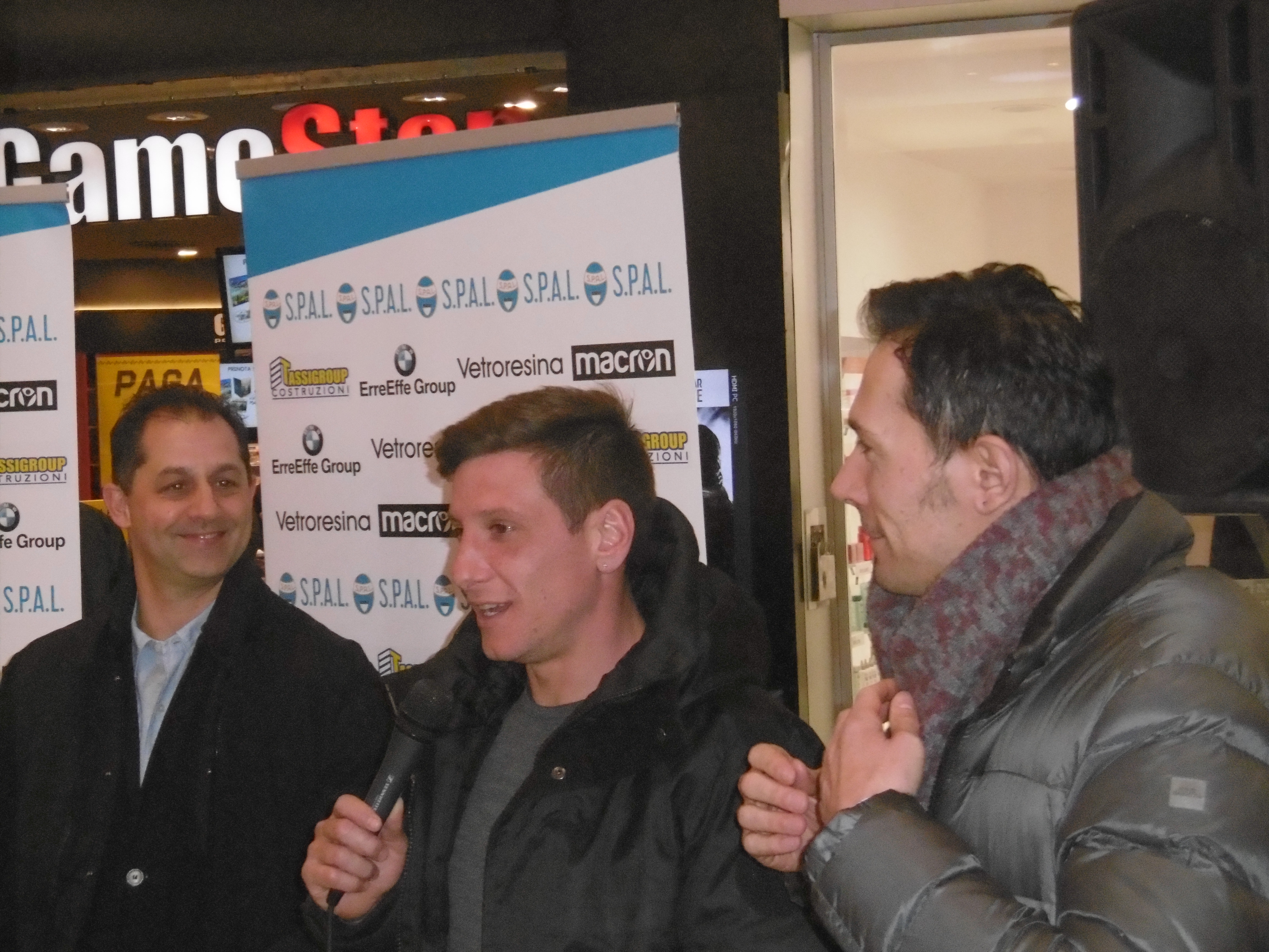 Eros Schiavon